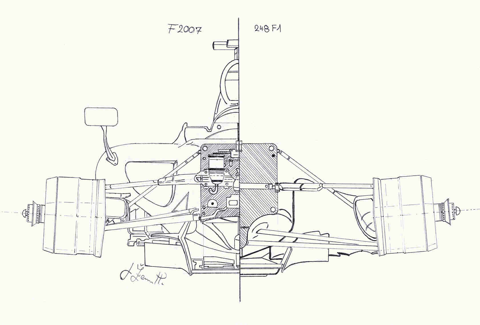 Ferrari F2007/248F1 Zero keel concept/Single keel concept